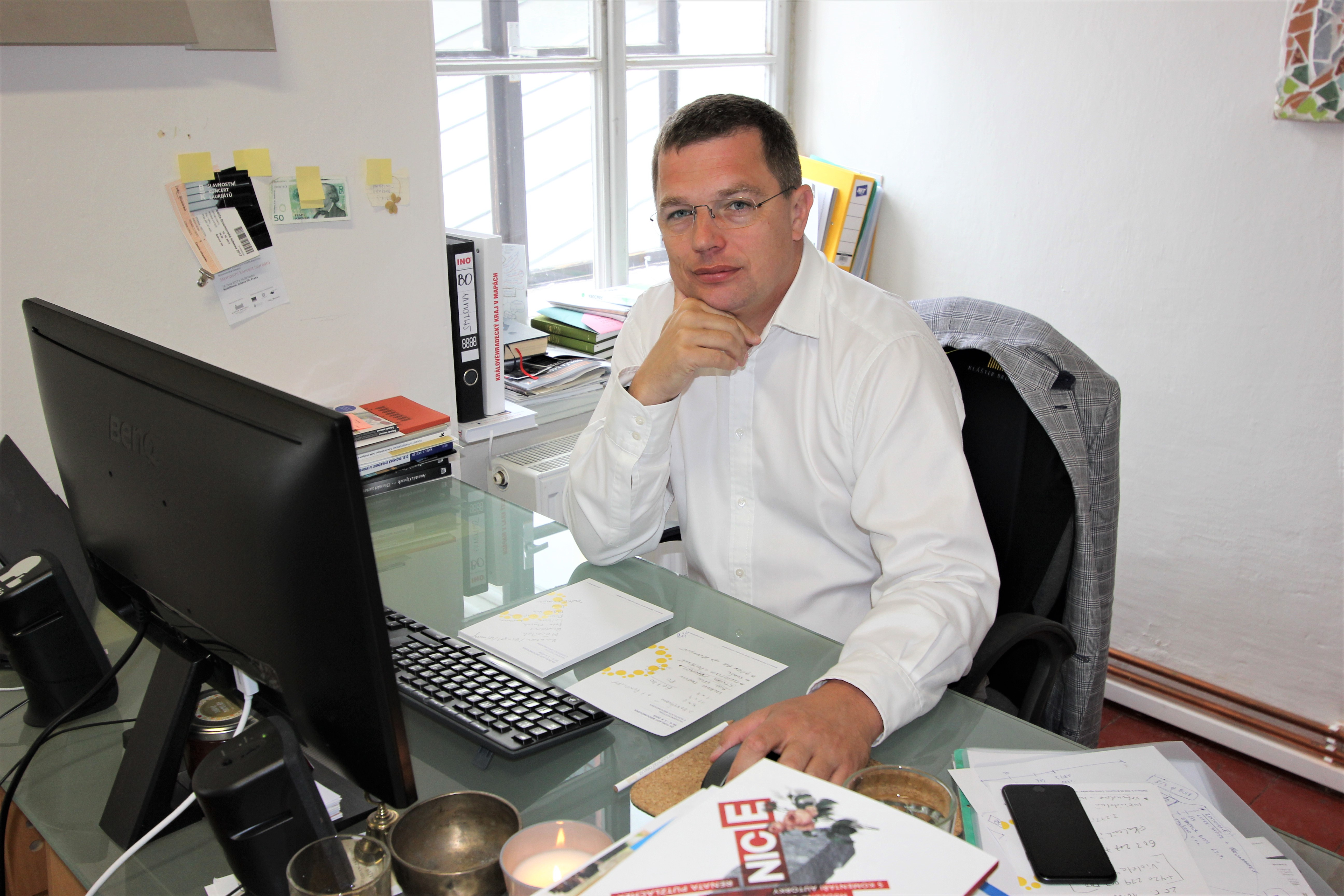 Jan Školník